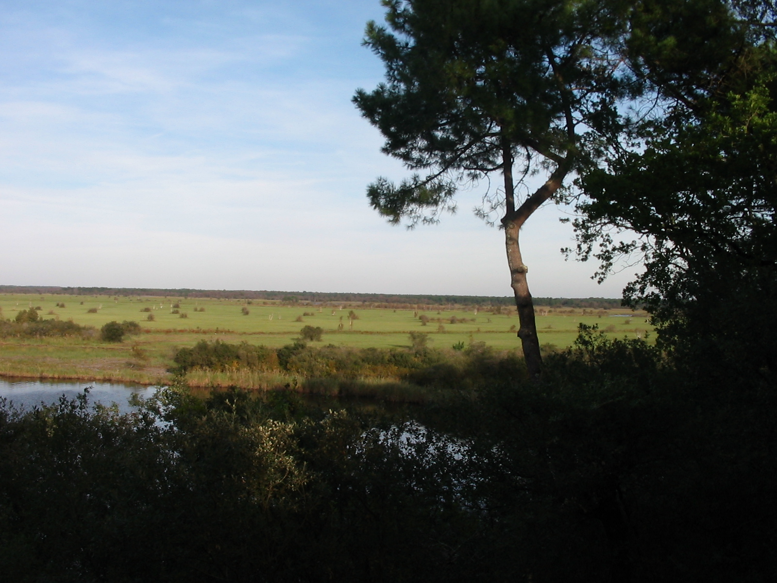 Etang de Cousseau in Lacanau, France.